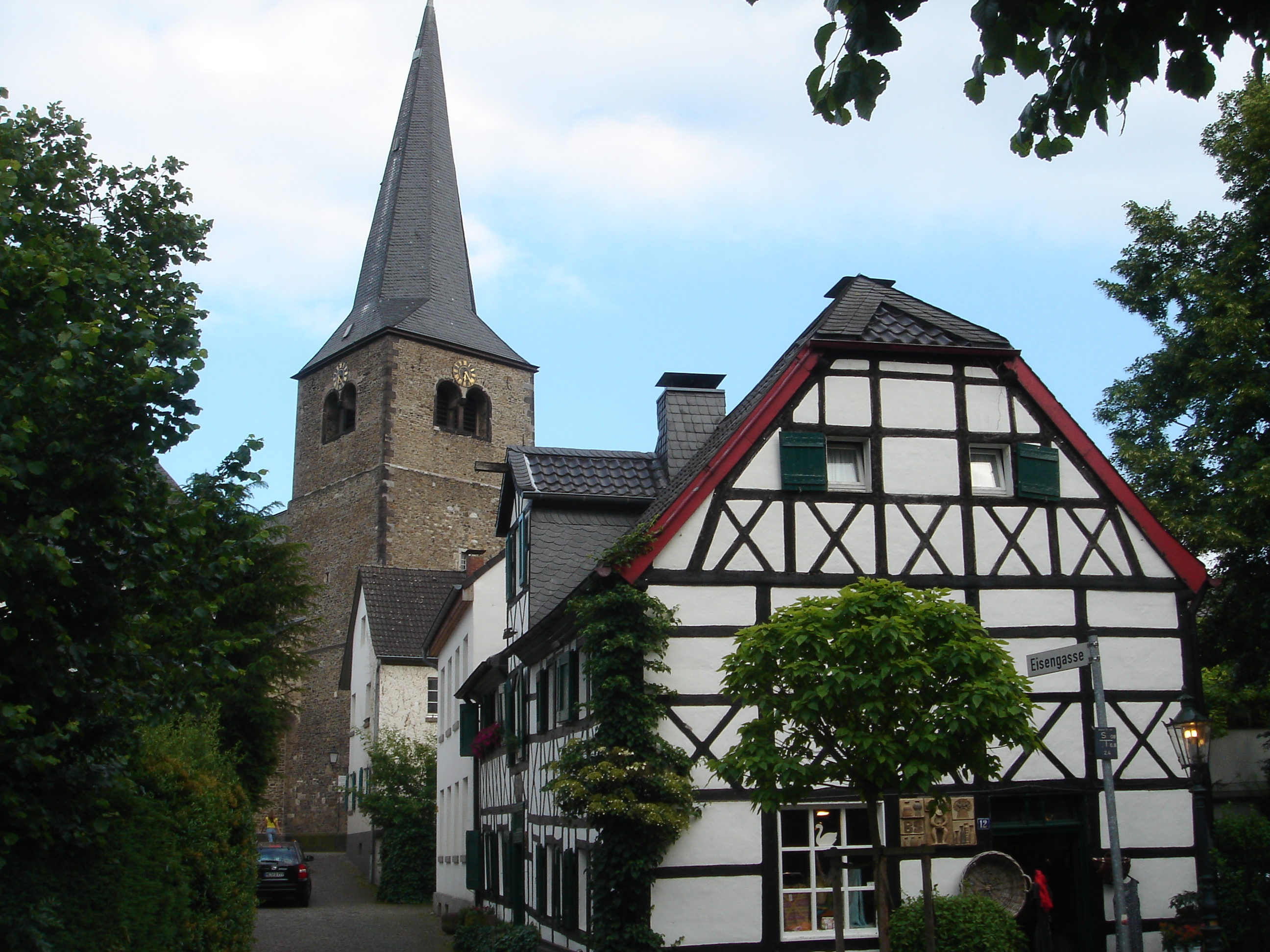 Summary Die Reformationskirche und Fachwerkhäuser in der Eisengasse in Hilden. Selbst fotografiert Juni 06 von Benutzer:Bordeaux. Licensing